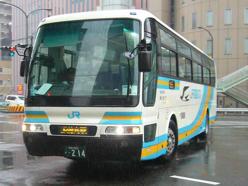 登録番号:徳島200か・214 JR四国バス(JR Shikoku bus)所属 神戸 - 徳島線用 三菱ふそう・エアロバス KL-MS86MP